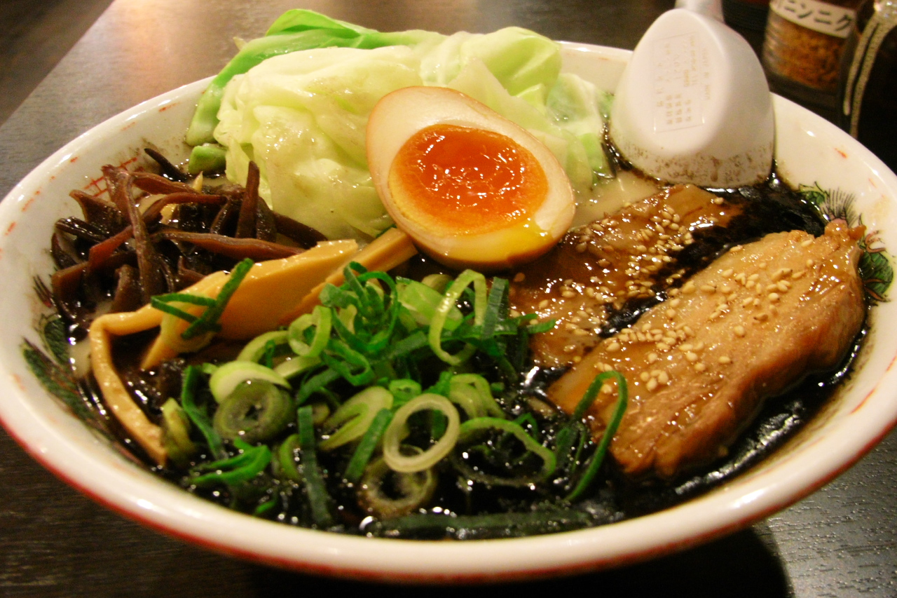 横浜ヨドバシの地下にある清正の豚角煮ラーメン。